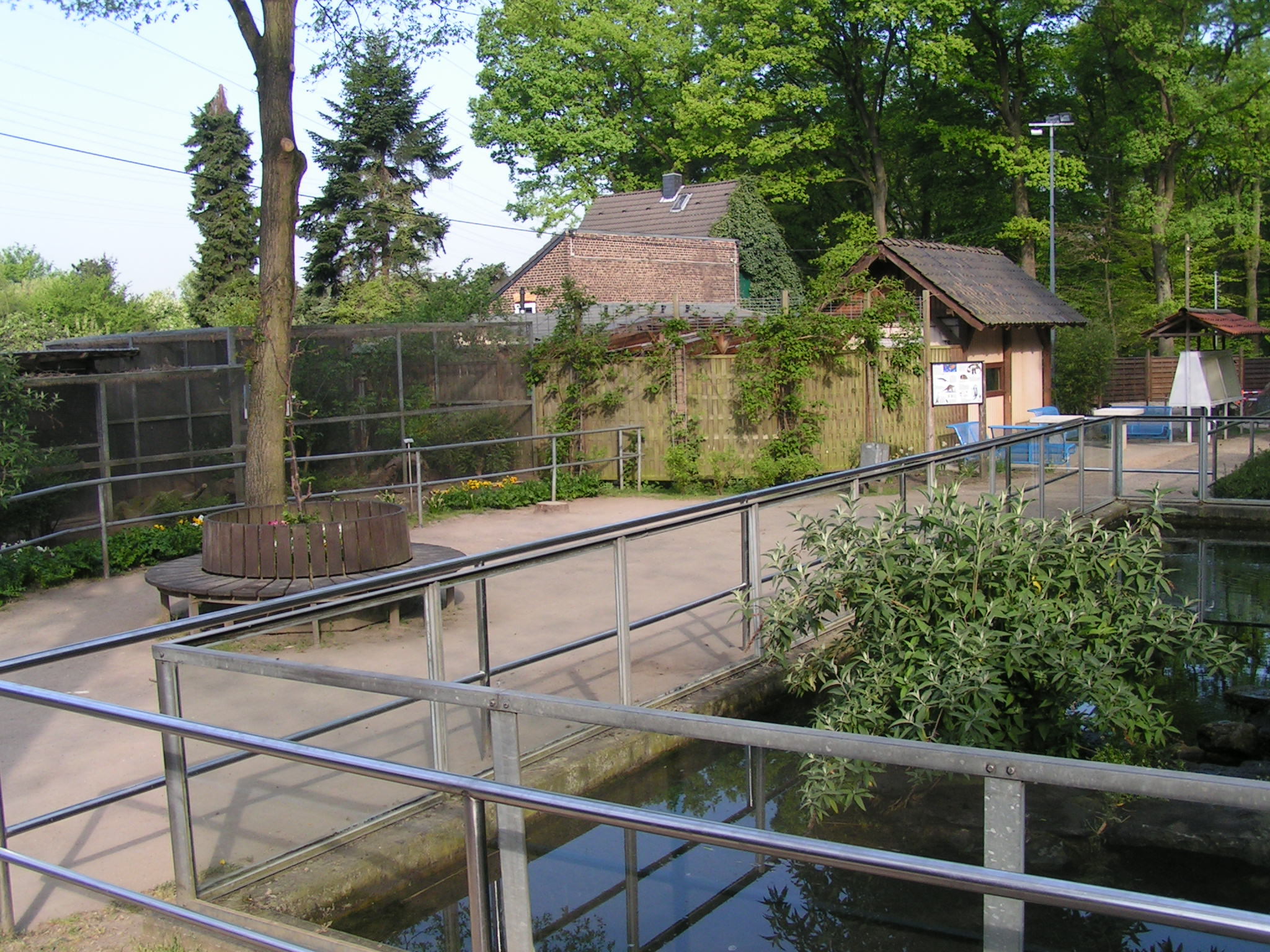 Bird cages at "Wildpark Reuschenberg", Leverkusen, Germany